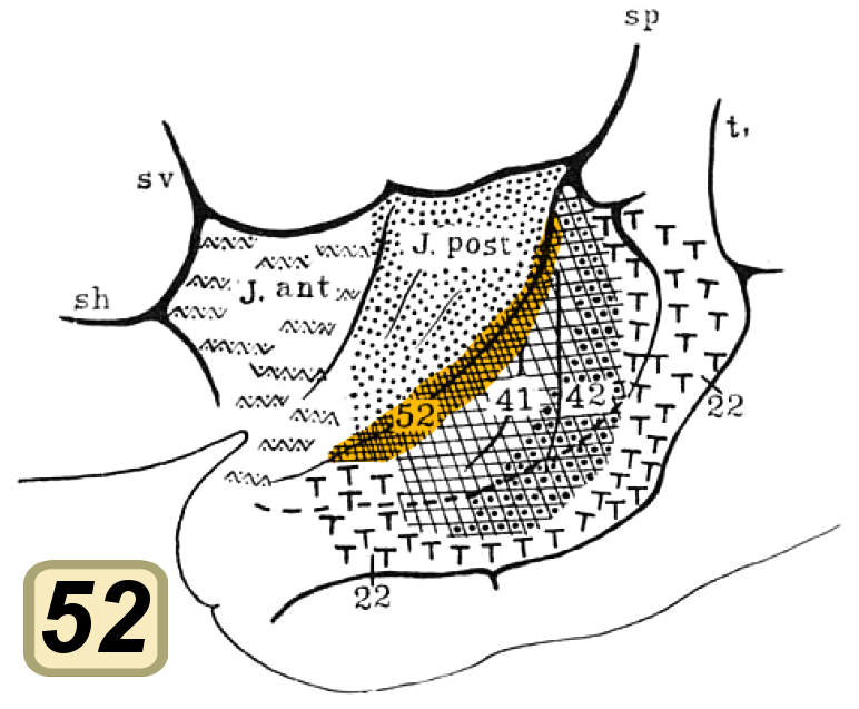 Brodmann area 52